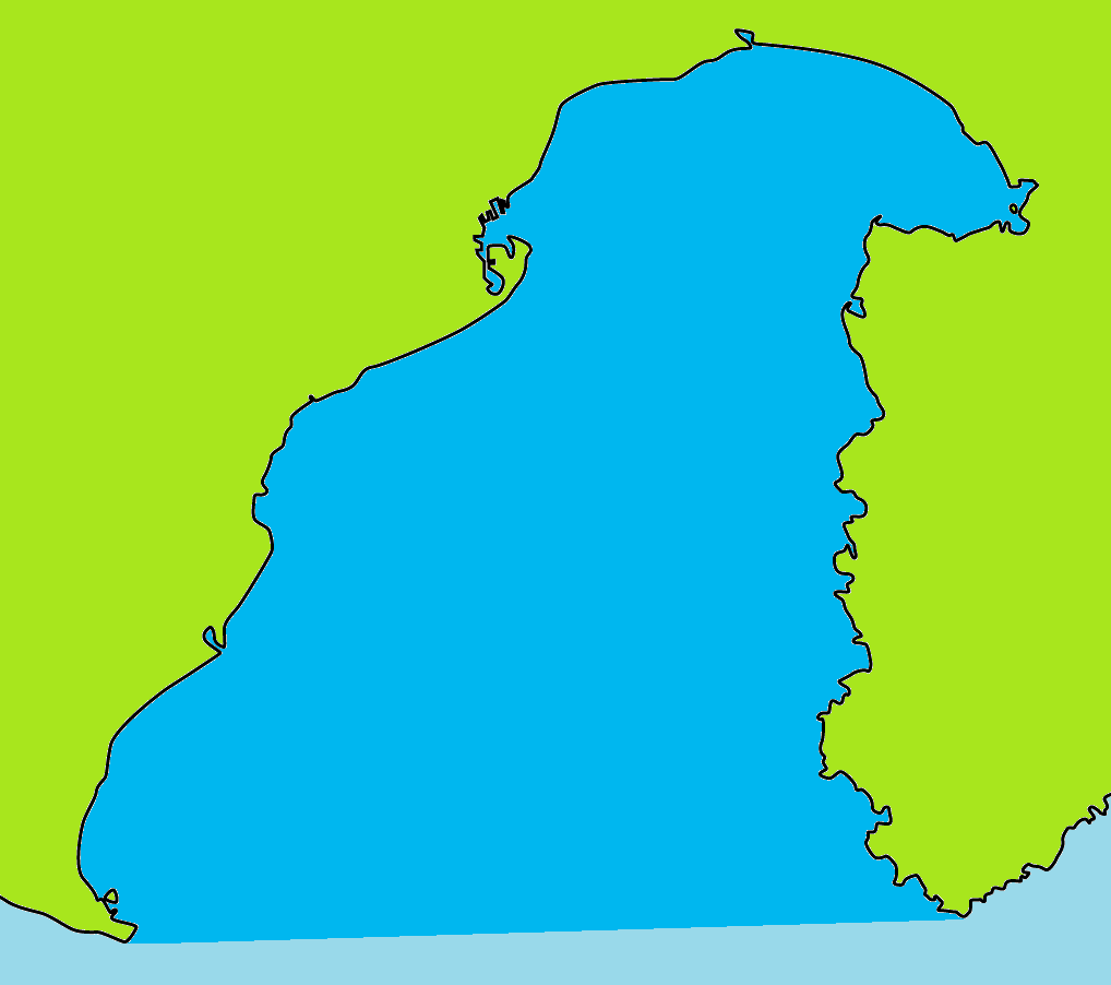 駿河湾の範囲を示した地図。 海岸線そのものは白地図専門店より。